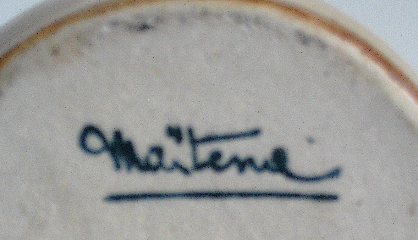 Signature Maitena, grès de Pont-des-Vernes, France